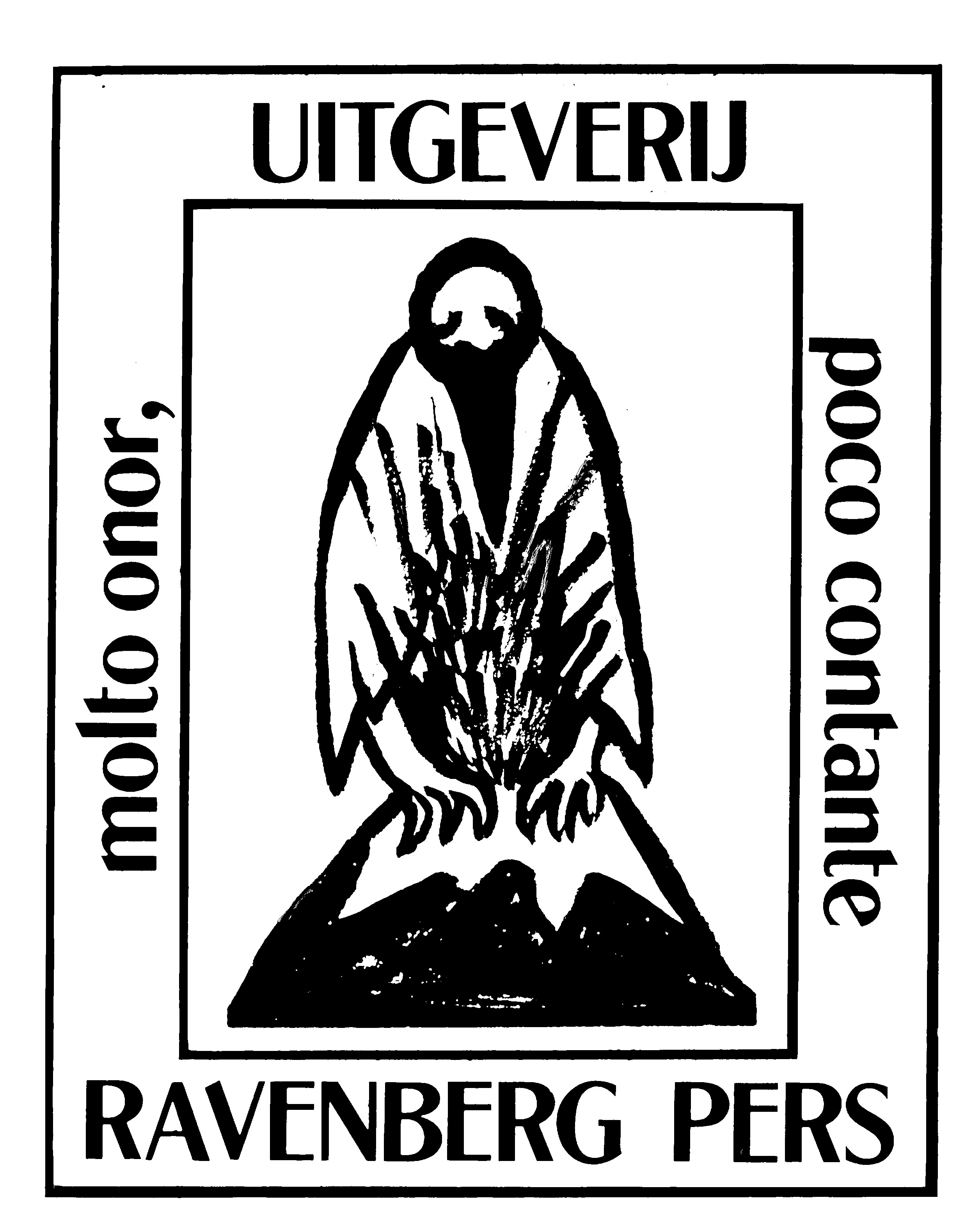 Logo of publishing house Ravenberg Pers